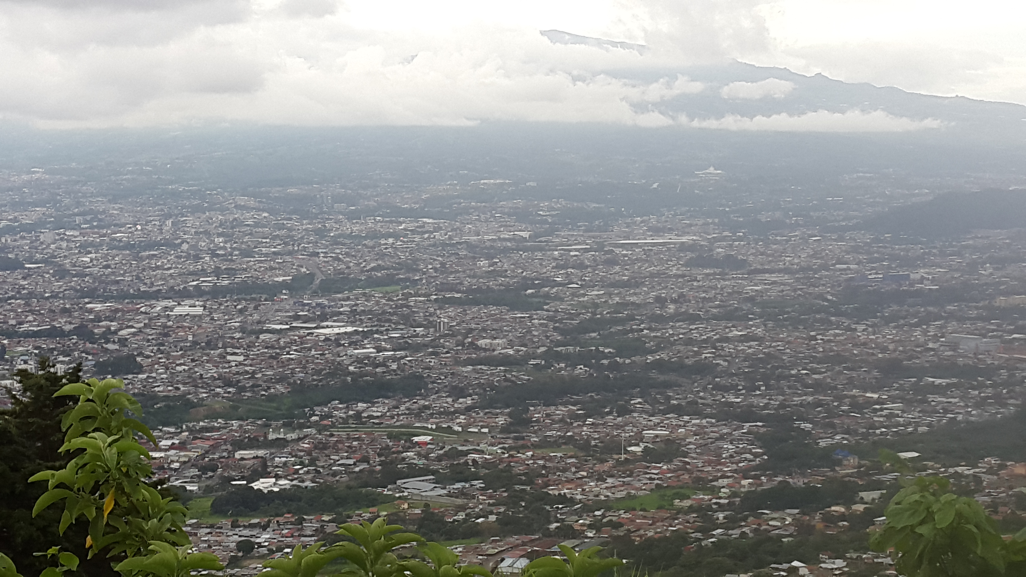 Vista al Valle Central de Costa Rica, con la ciudad de San José en primer plano, desde los cerros de Escazú.